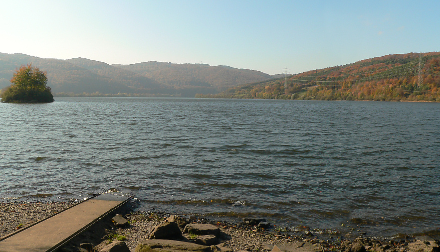 Affolder(ner) See.